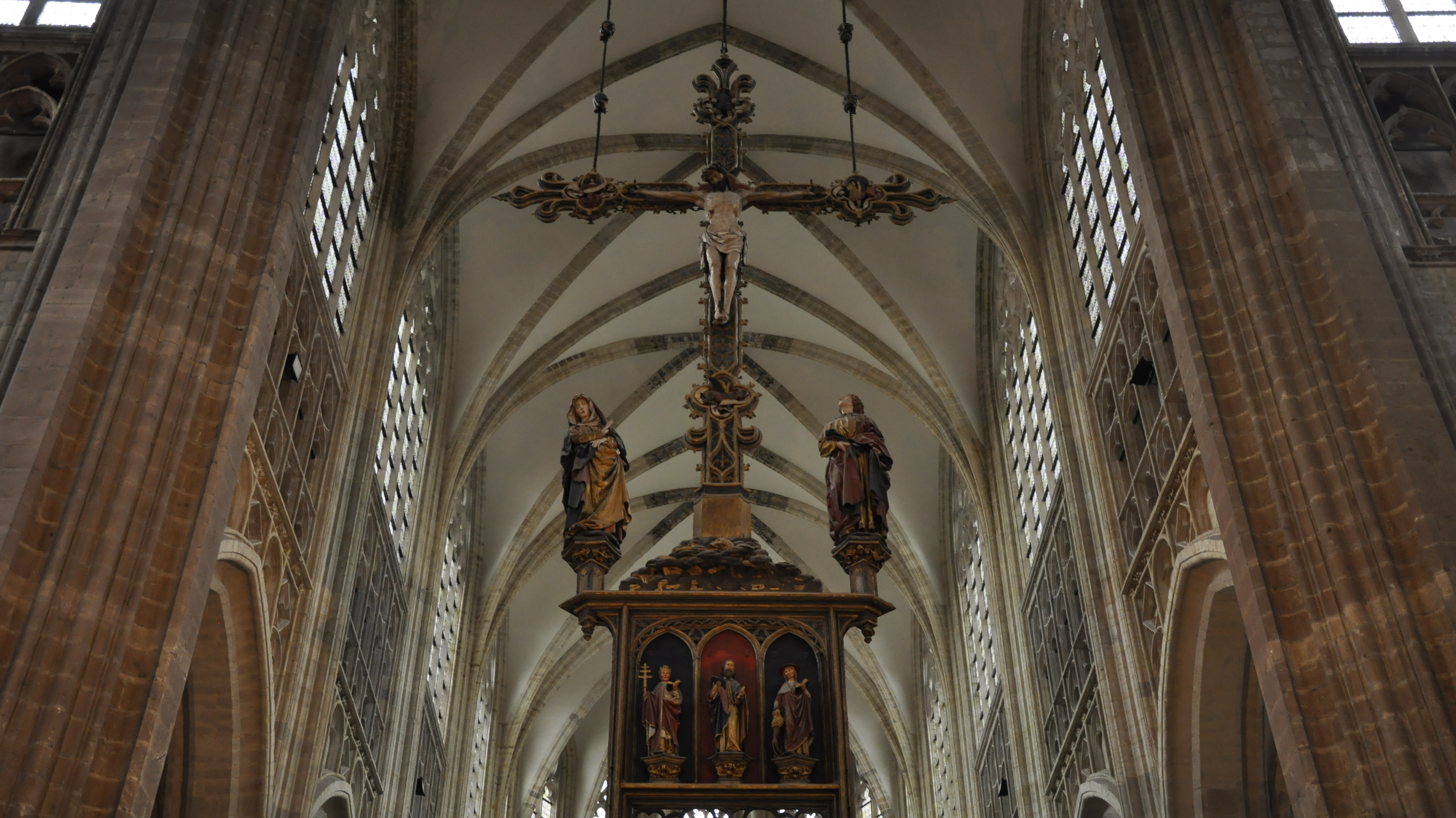 Leuven Sint-Pieterskerk triomfkruis Jan Borreman 23-11-2013 This photo of immovable heritage has been taken in the Flemish Region